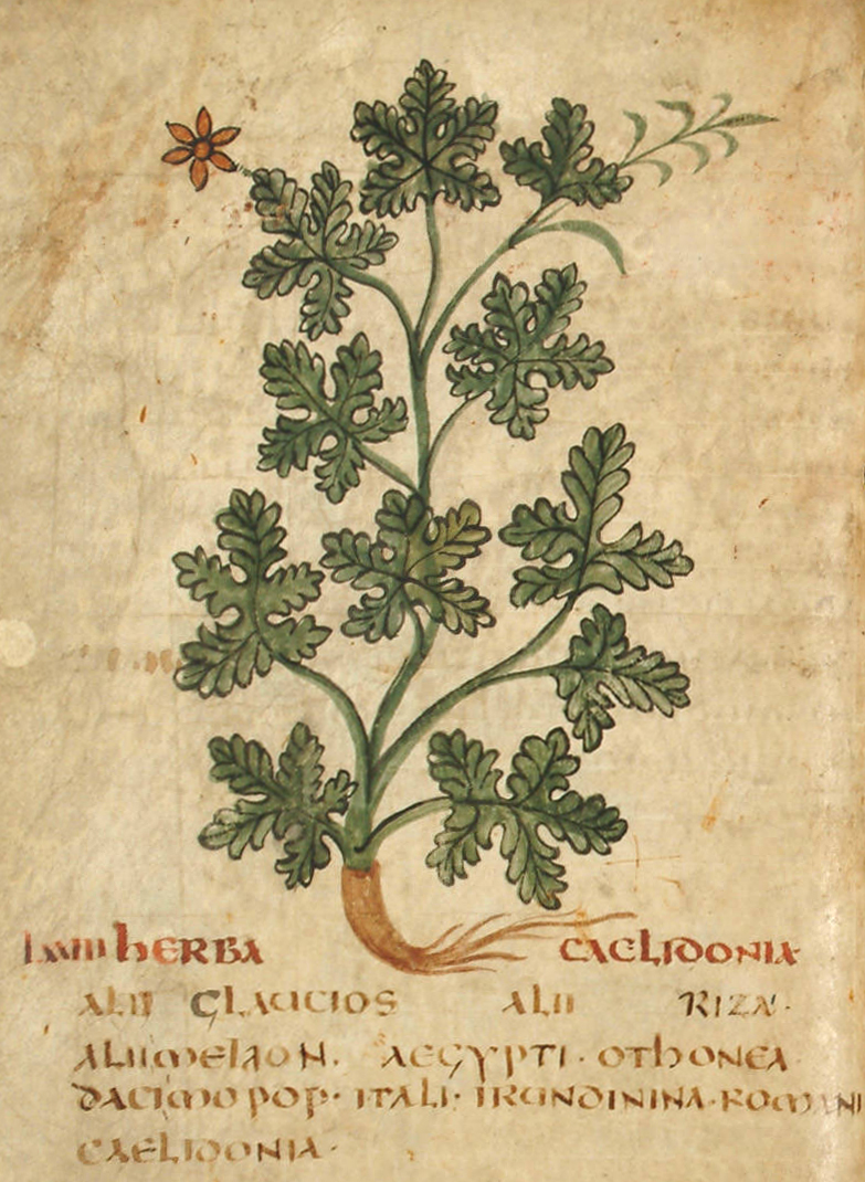 Abbildung von Caelidonia